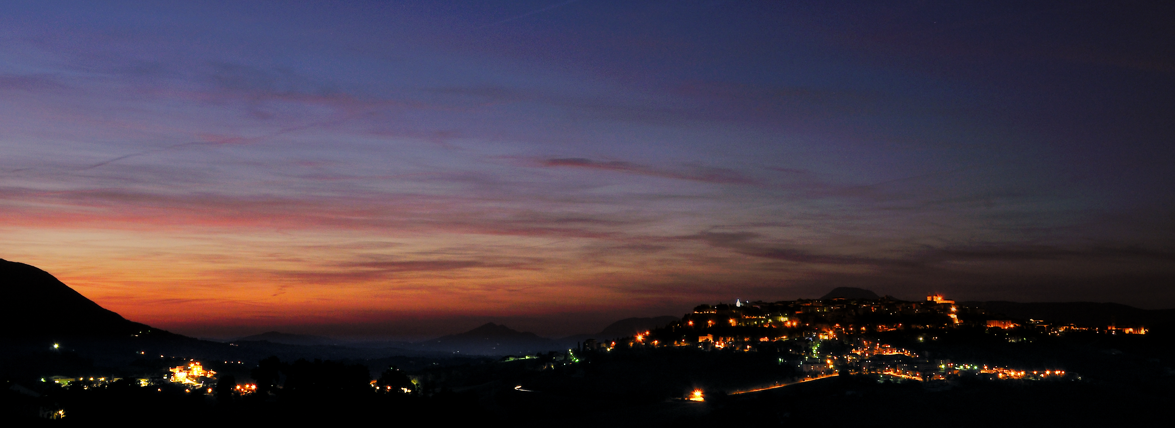 La Città di Camerino al tramonto.